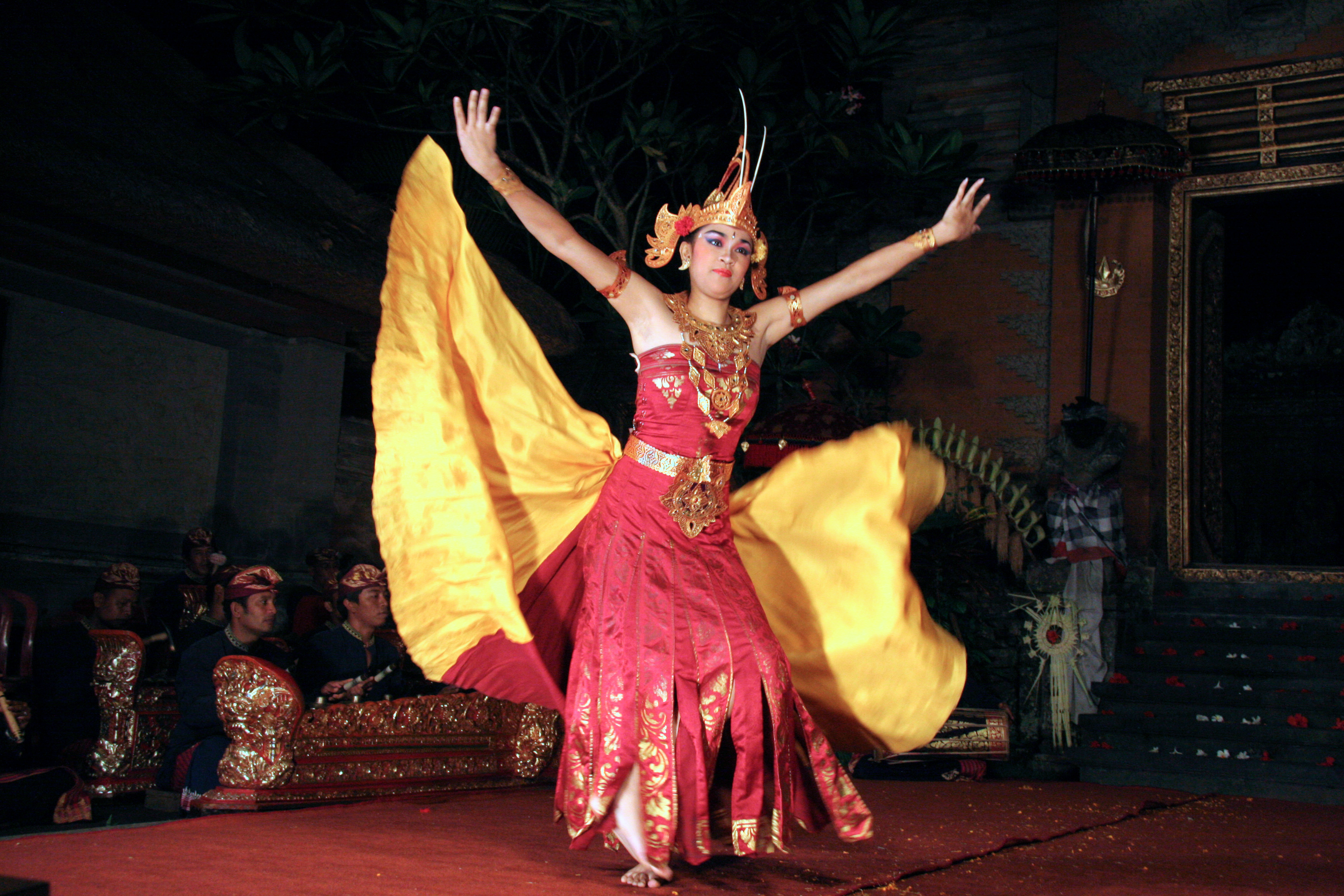 Bali Ubud danseuse